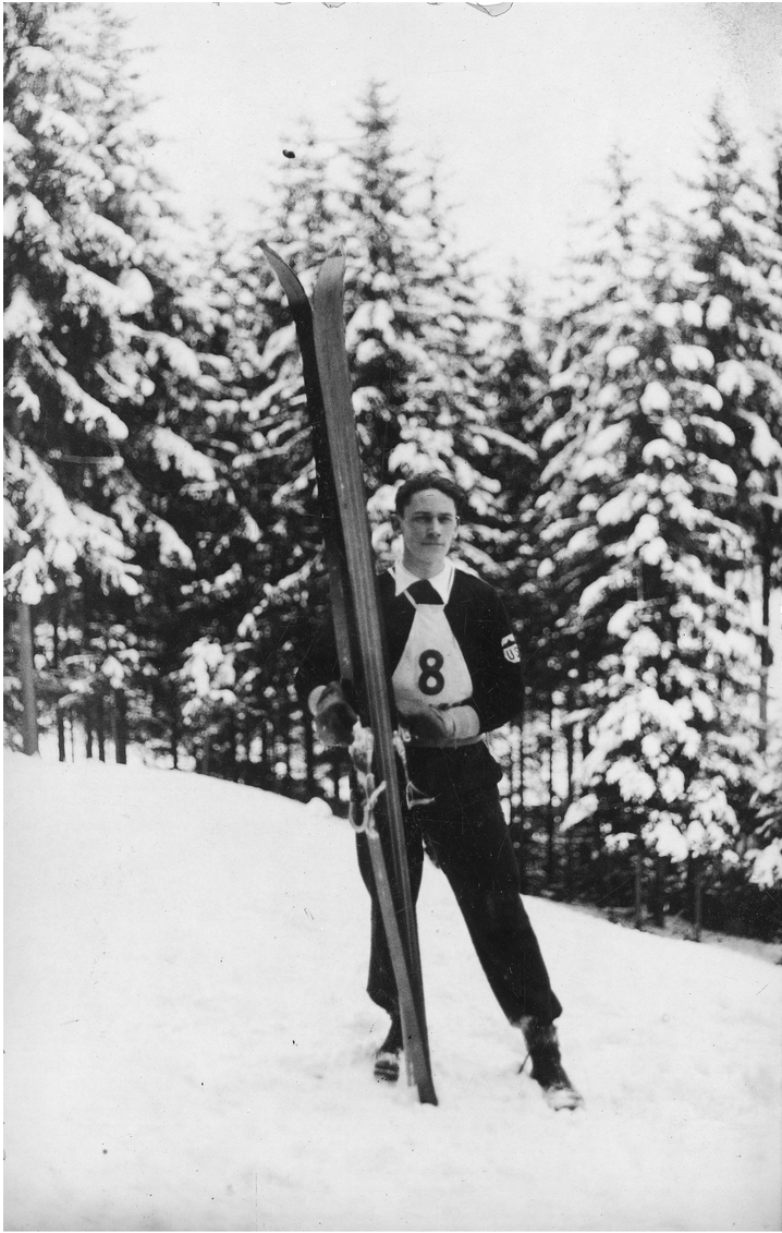 Edgars Gruzitis en 1934.